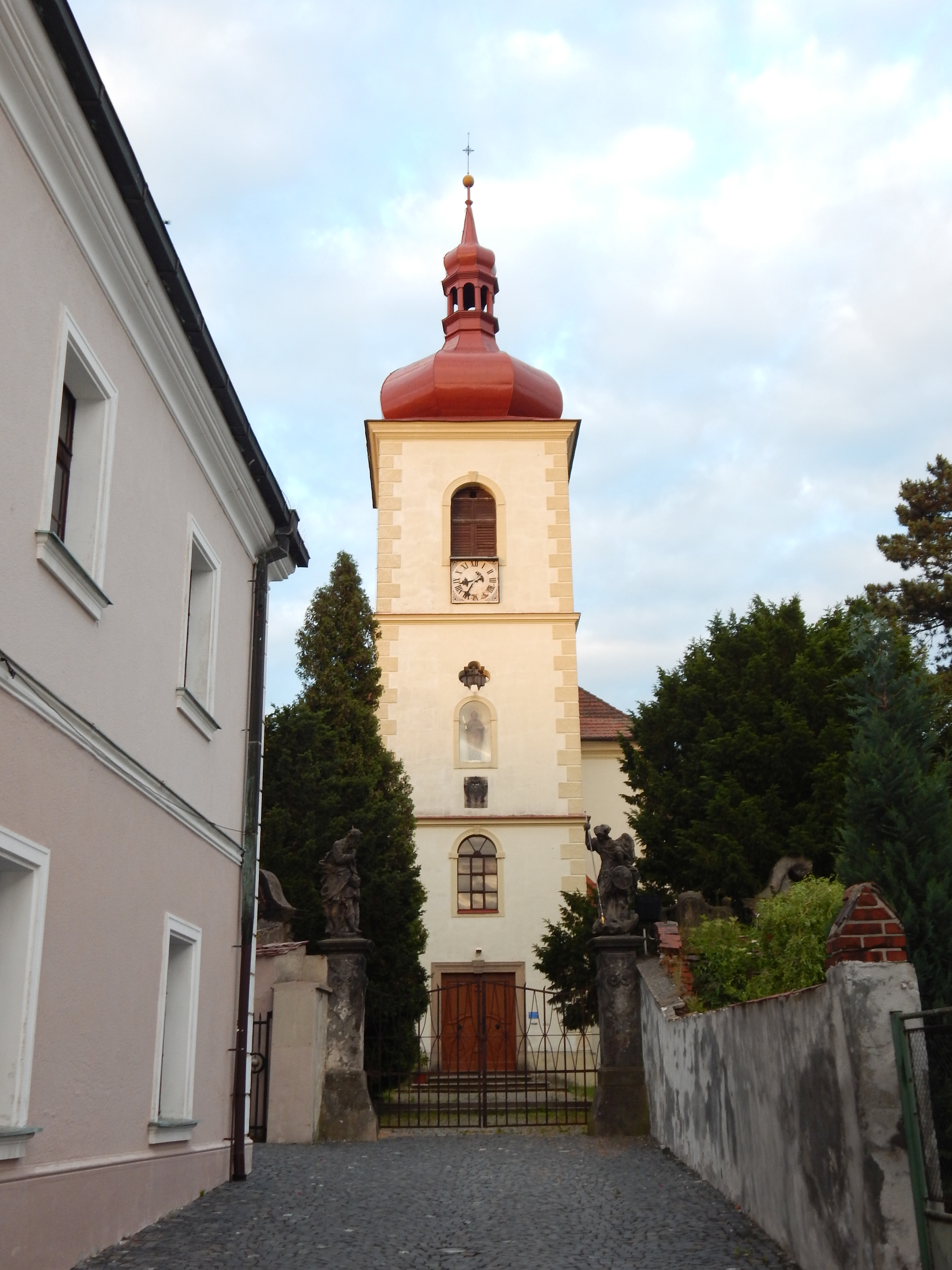 Kostel sv. Bartoloměje v Hrádku nad Nisou.